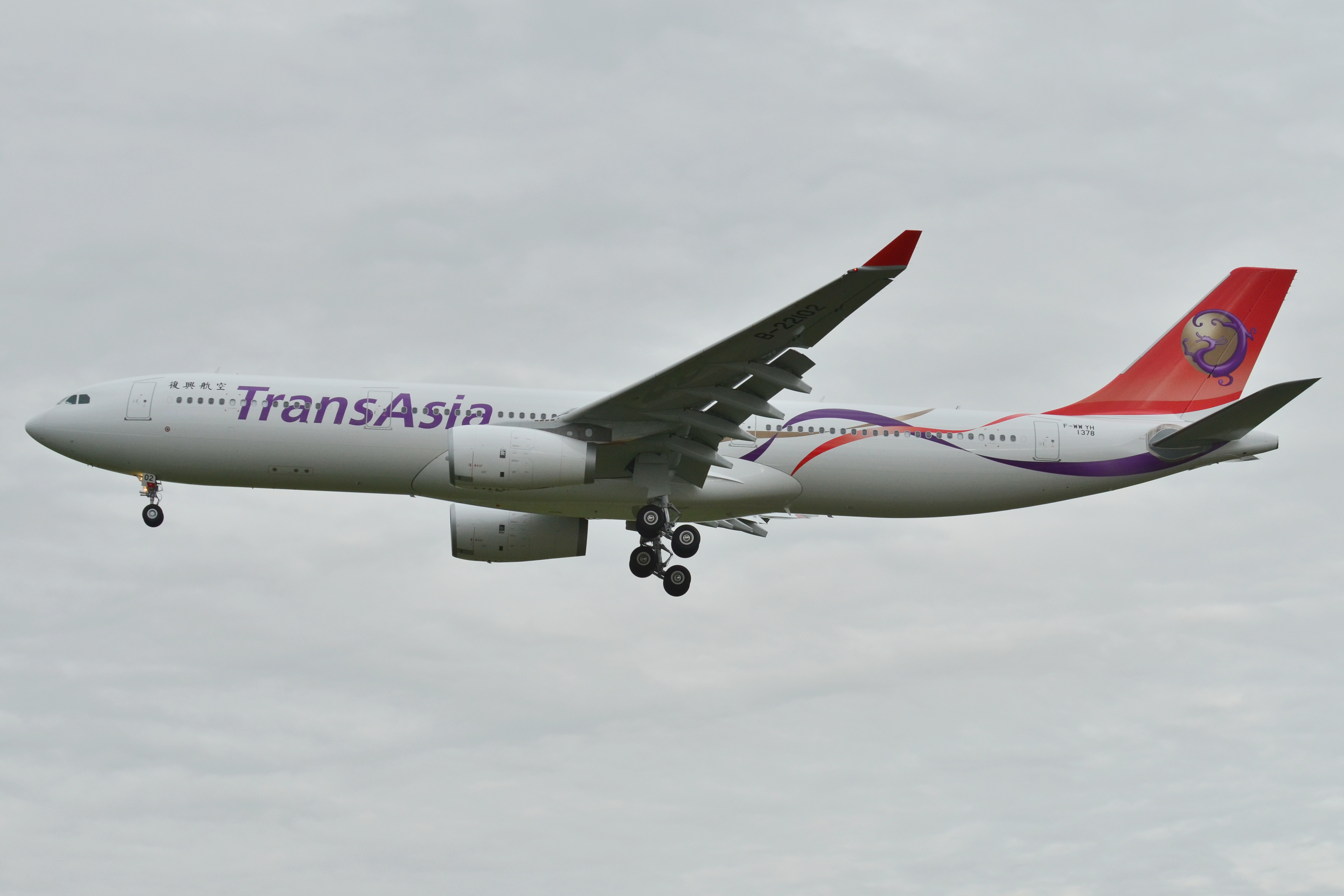 Photo prise à l'aéroport de Toulouse-Blagnac (LFBO) en France. Picture take at Toulouse-Blagnac Airport (LFBO) in France.